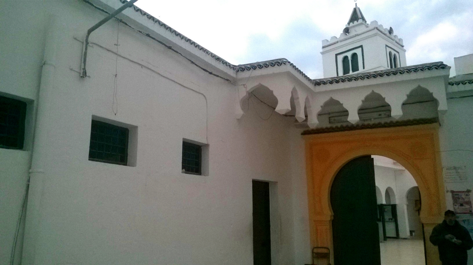 La médina de Tunis مدينة تونس العتيقة